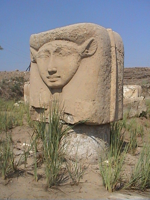 Colonne et chapiteau hathorique du temple d'Hathor à Memphis - Mit Rahineh